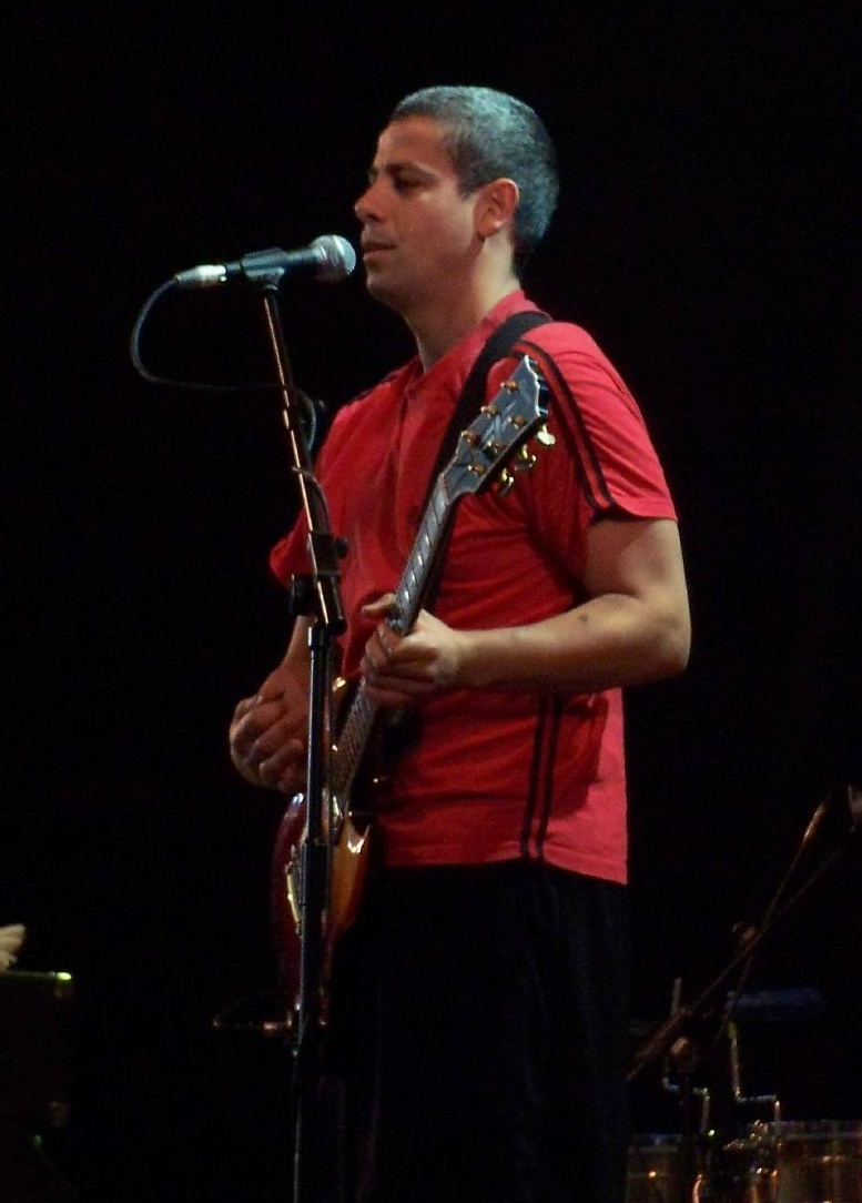 El guitarrista fraco-argelino Madjid Fahem en vivo.